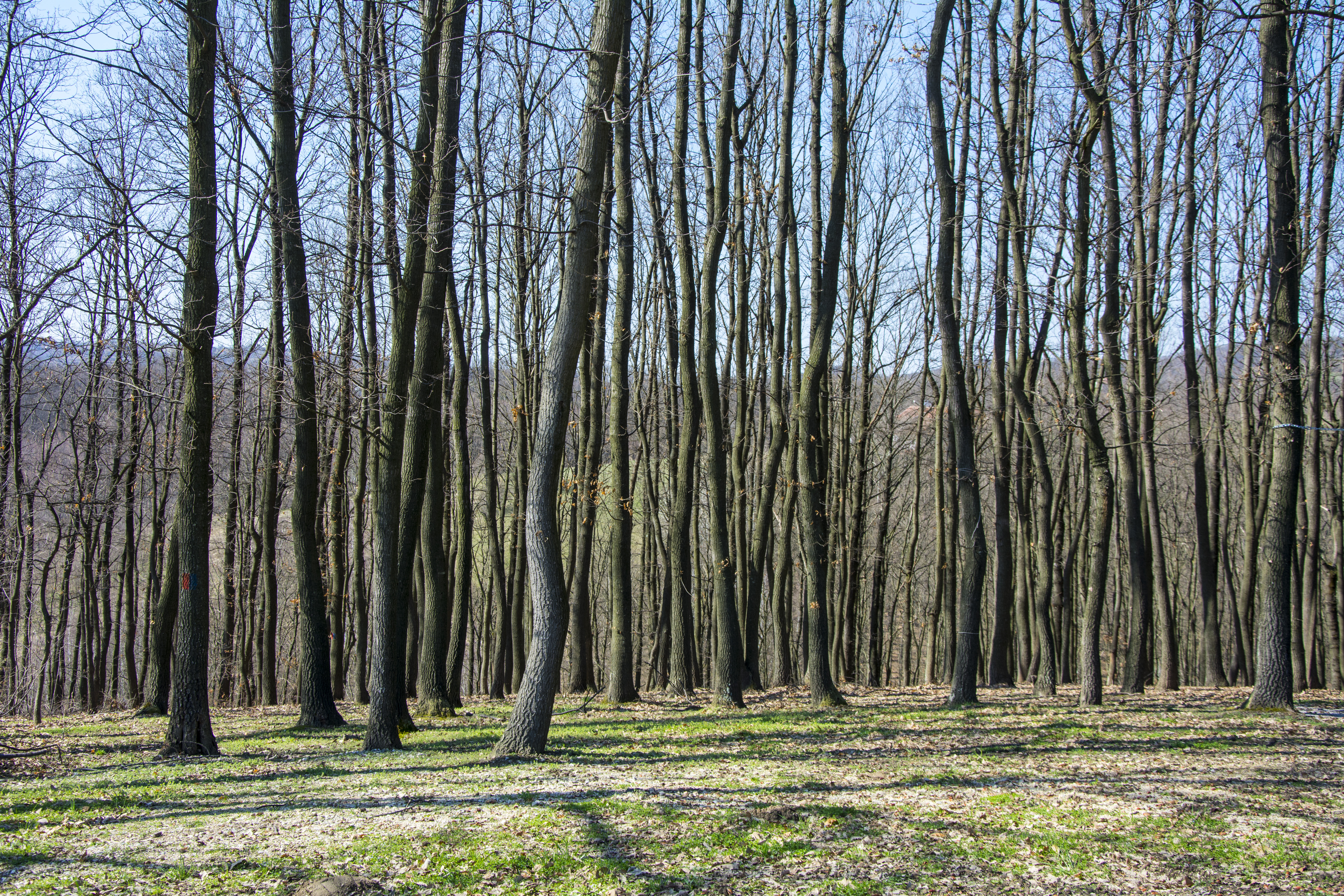 Ово је фотографија заштићеног природног добра у Србији под шифром: ПП18 This is a a photo of a natural area in Serbia with ID: ПП18 Бељаница у близини Винатоваче